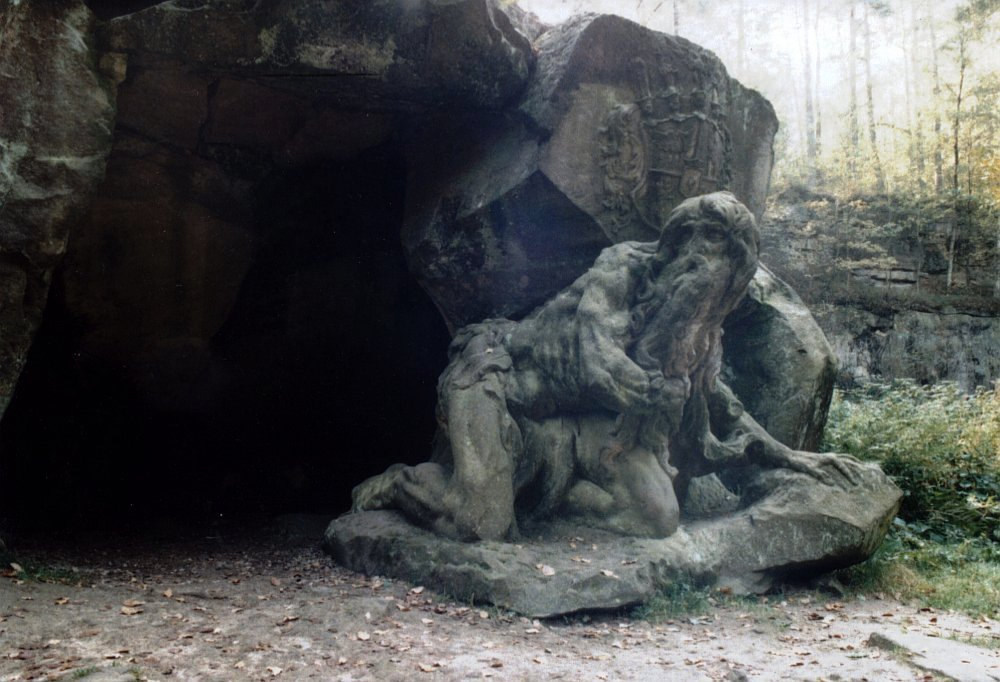 Poustevník Juan Garin před svou jeskyní, Nový les u Kuksu, Matyáš Bernard Braun a jeho dílna 1723-26